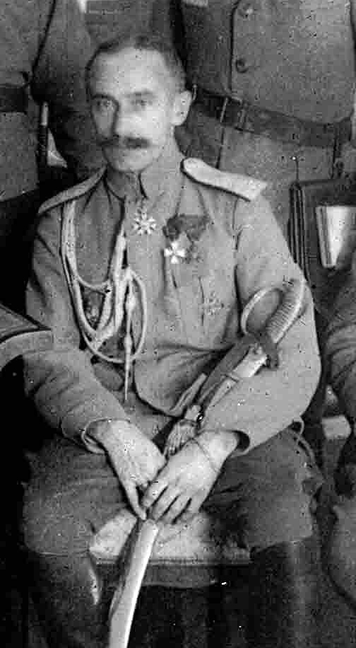 Борис Петрович Богословский (1885—1920)